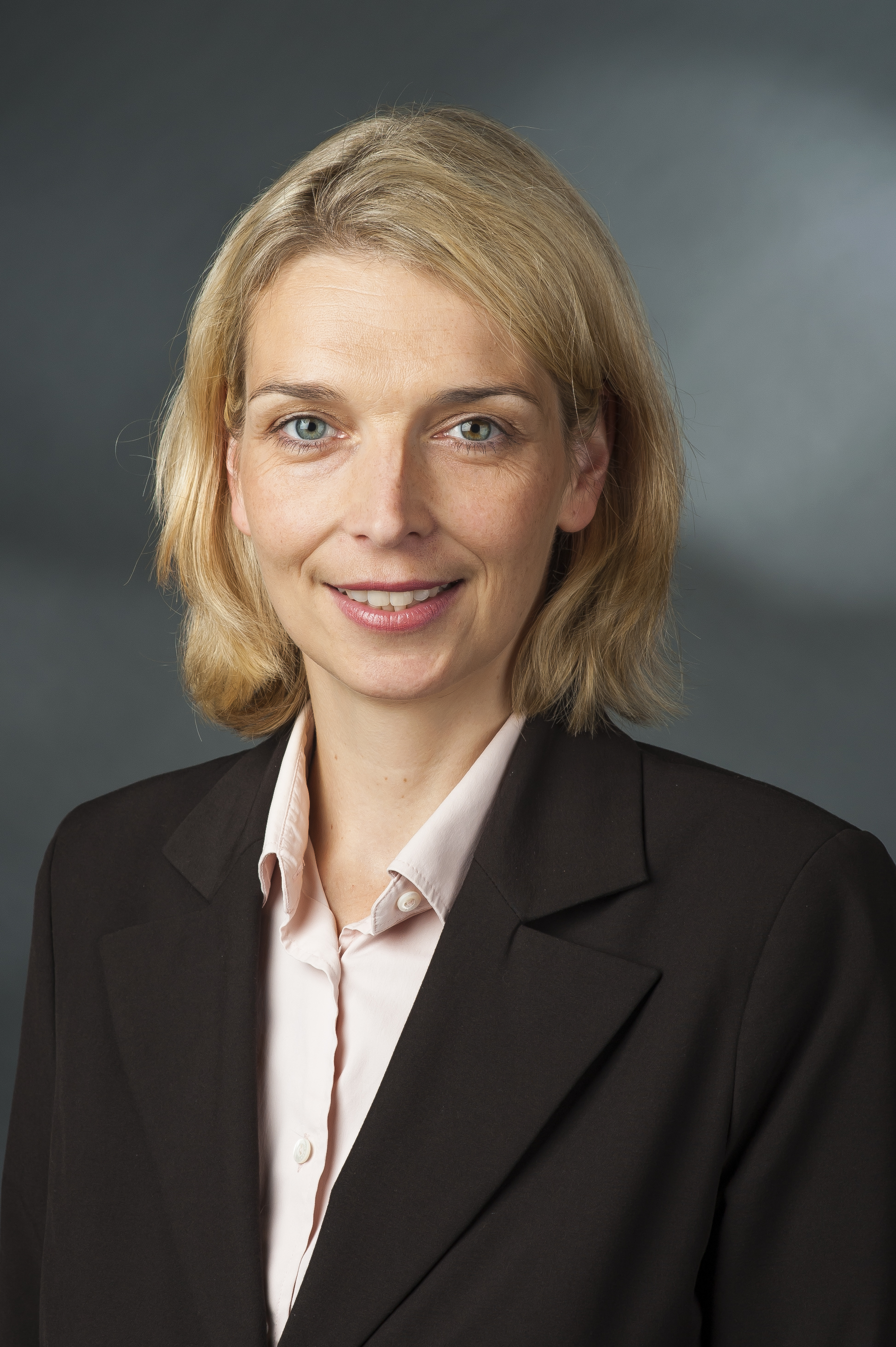 Svenja Stadler (* 26. August 1976 in Oldenburg (Oldenburg)) ist eine deutsche Politikerin der SPD. Seit dem 22. Oktober 2013 gehört sie dem Deutschen Bundestag an.